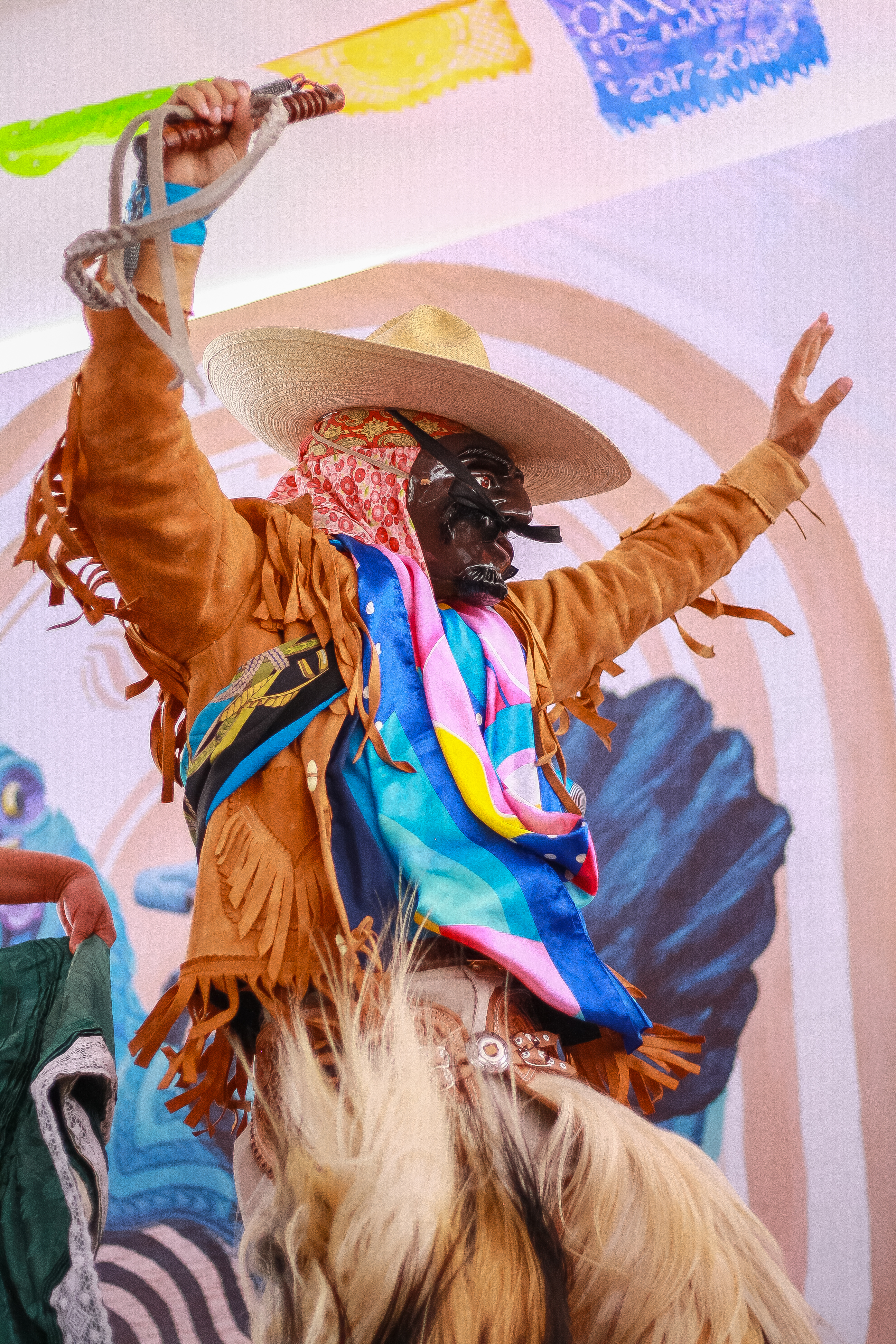 La danza de los Rubios, es una de las danzas que se baila dentro del carnaval de Santiago Juxtlahuaca. Esta interpretación relata experiencias de los arreadores de ganado, quienes al terminar su jornada de trabajo, alrededor de una fogata, entre trago y trago de aguardiente, y a los sones del violín y la jarana, bailaban y comentaba las peripecias sufridas durante su travesía, dejando para la posteridad sus aventuras y reacciones ante las adversidades a las que se enfrentaban.